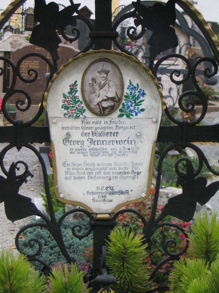 Georg Jennerweins Grab in Schliersee